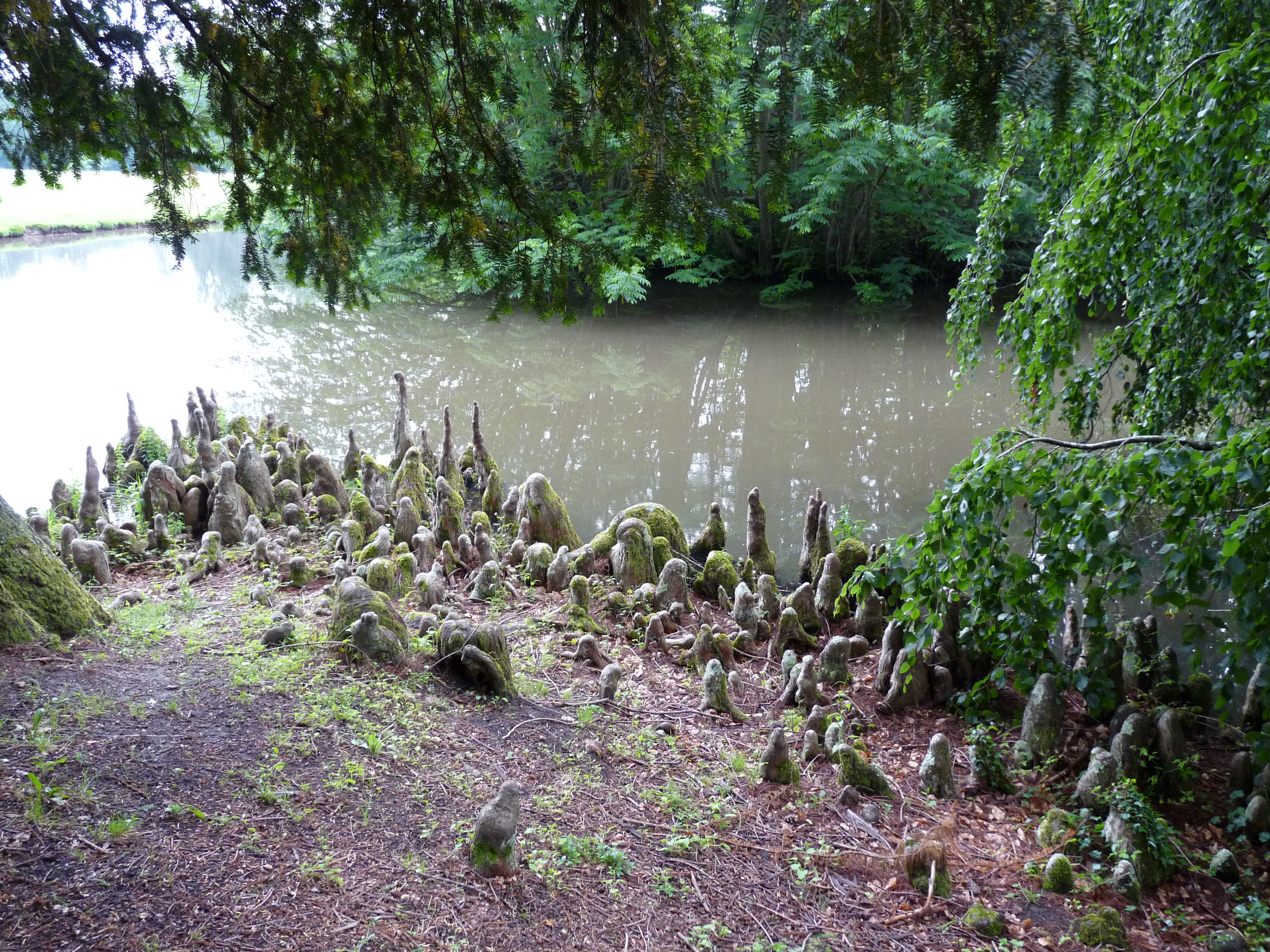 racines ou Pneumatophores de cyprès chauve à l'arboretum de Balaine (Allier)